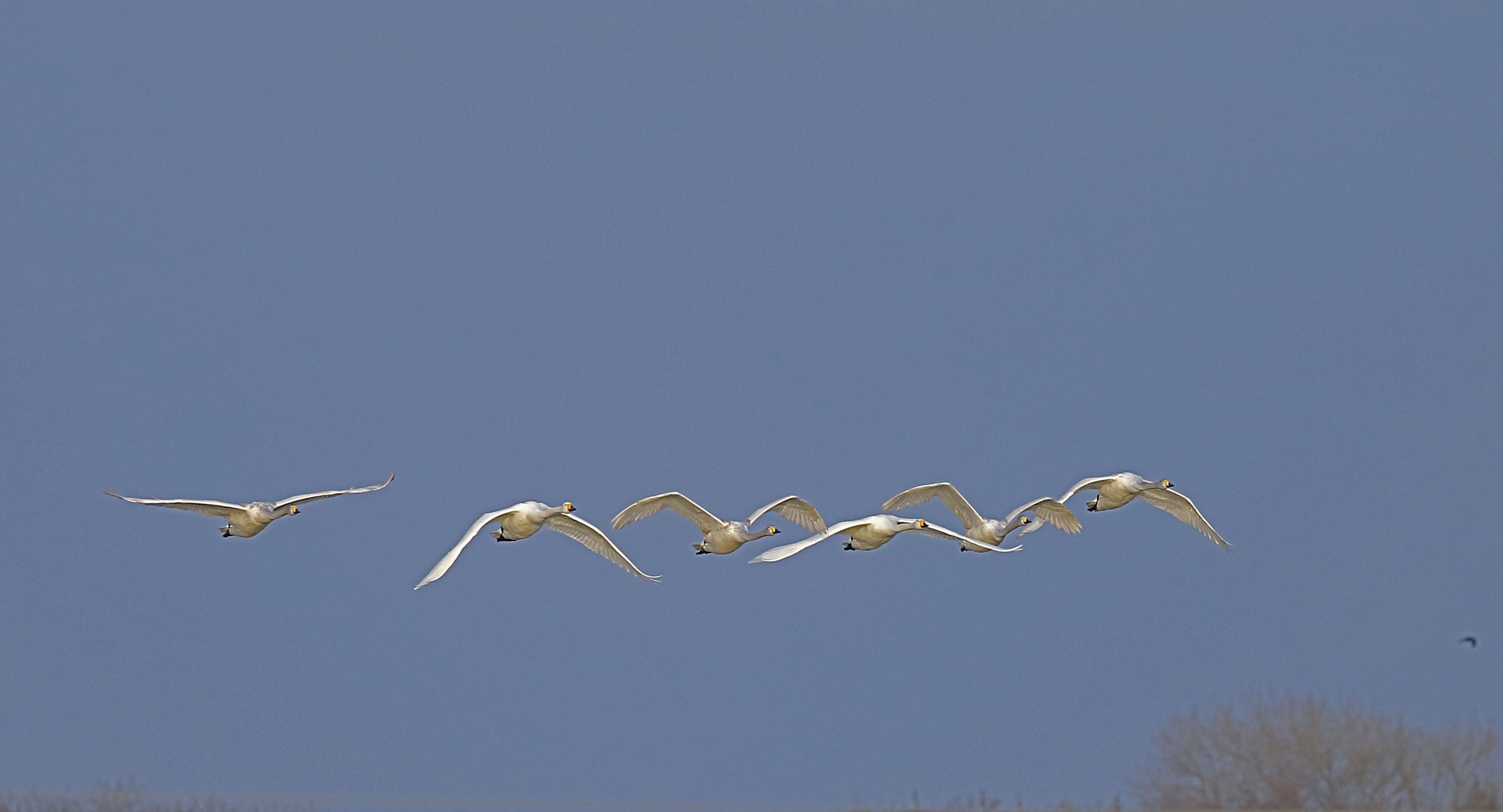 Fliegende Singschwäne